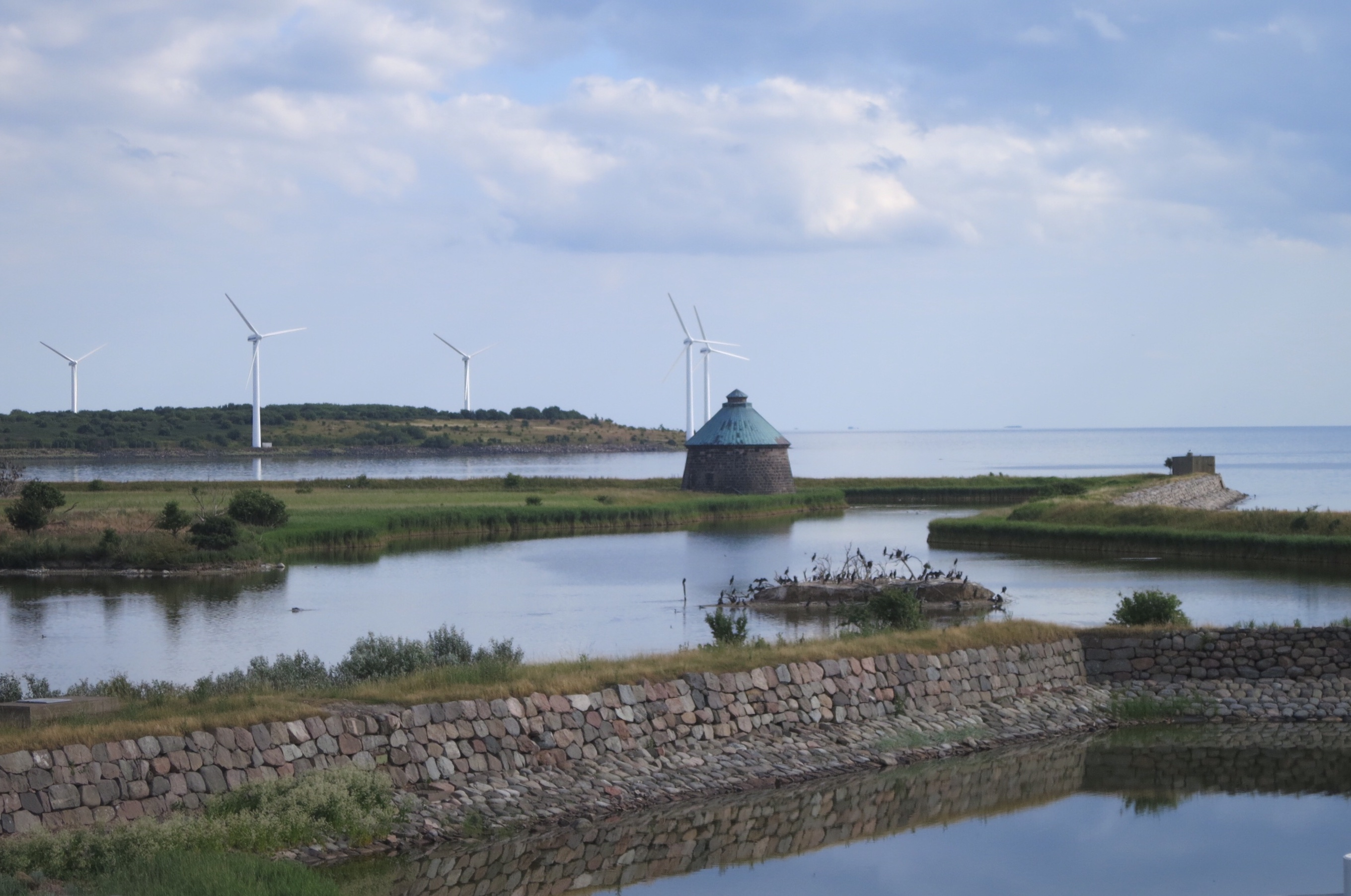 Gråen sedd från färjan från Ven.